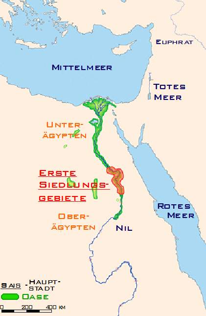 Ausdehnung des altes ägytischen Reiches (vordynastische Zeit) Karte wurde selbst erstellt